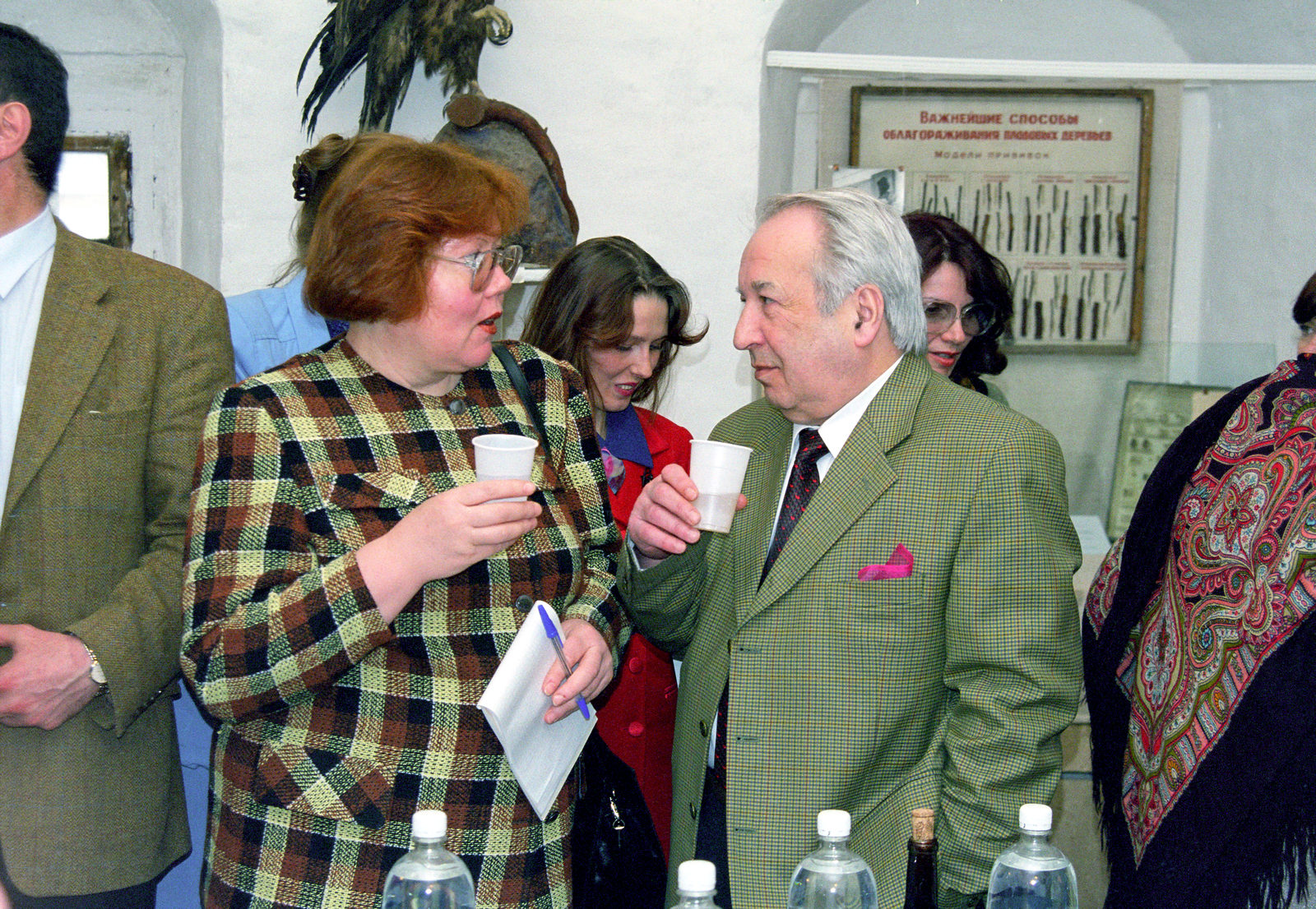 Переславский музей-заповедник, открытие выставки «В новое столетие. ОАО „Компания Славич“». Слева направо: Ирина Васильевна Колмаченкова (корреспондент кабельного телевидения), Альфред Карлович Айламазян (профессор, директор Института программных систем РАН, ректор Университета города Переславля).